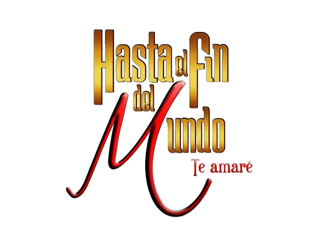 Logo de hasta el fin del mundo